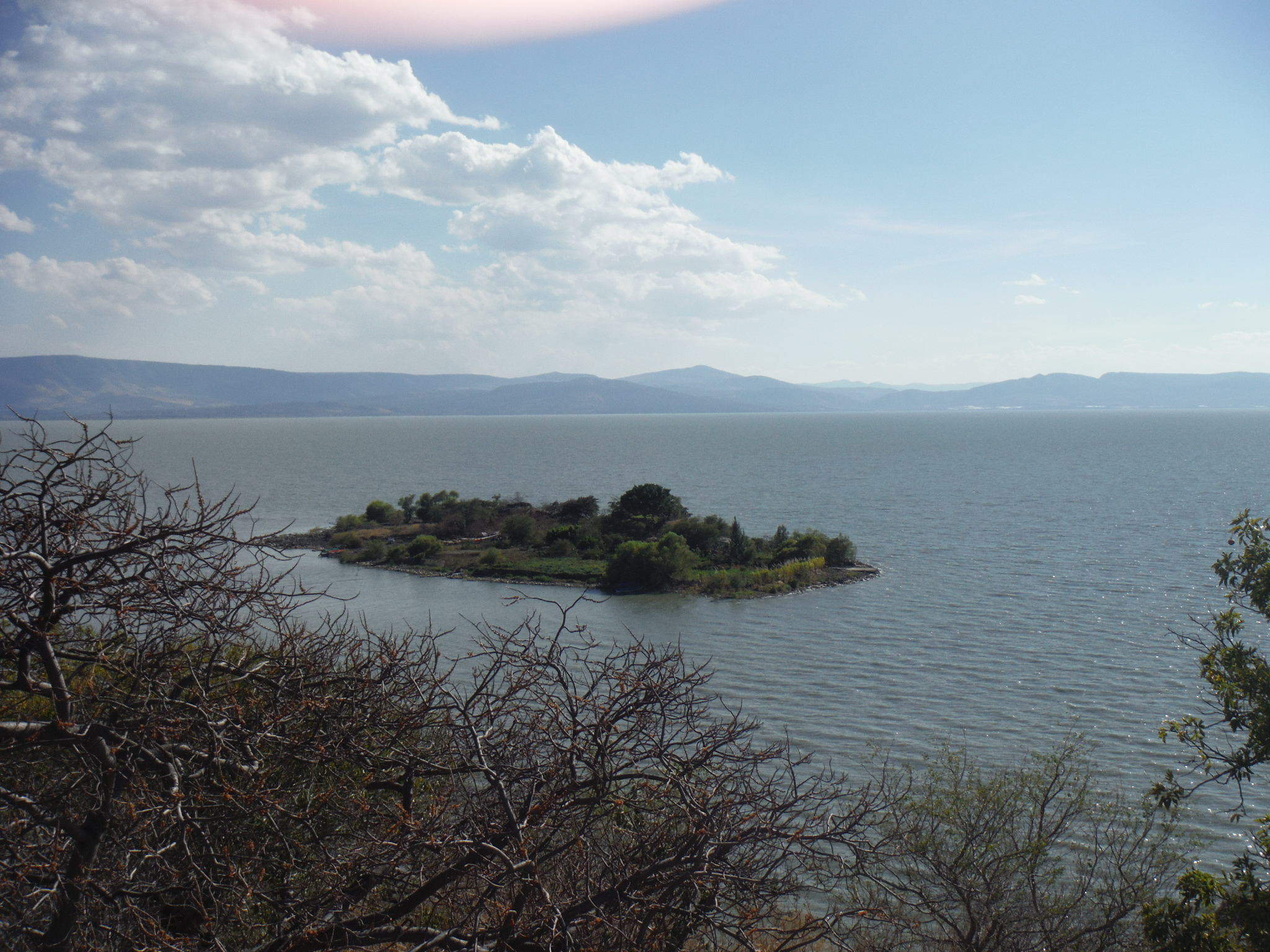 Pequeña isla adjunta a la Isla de Mezcala.